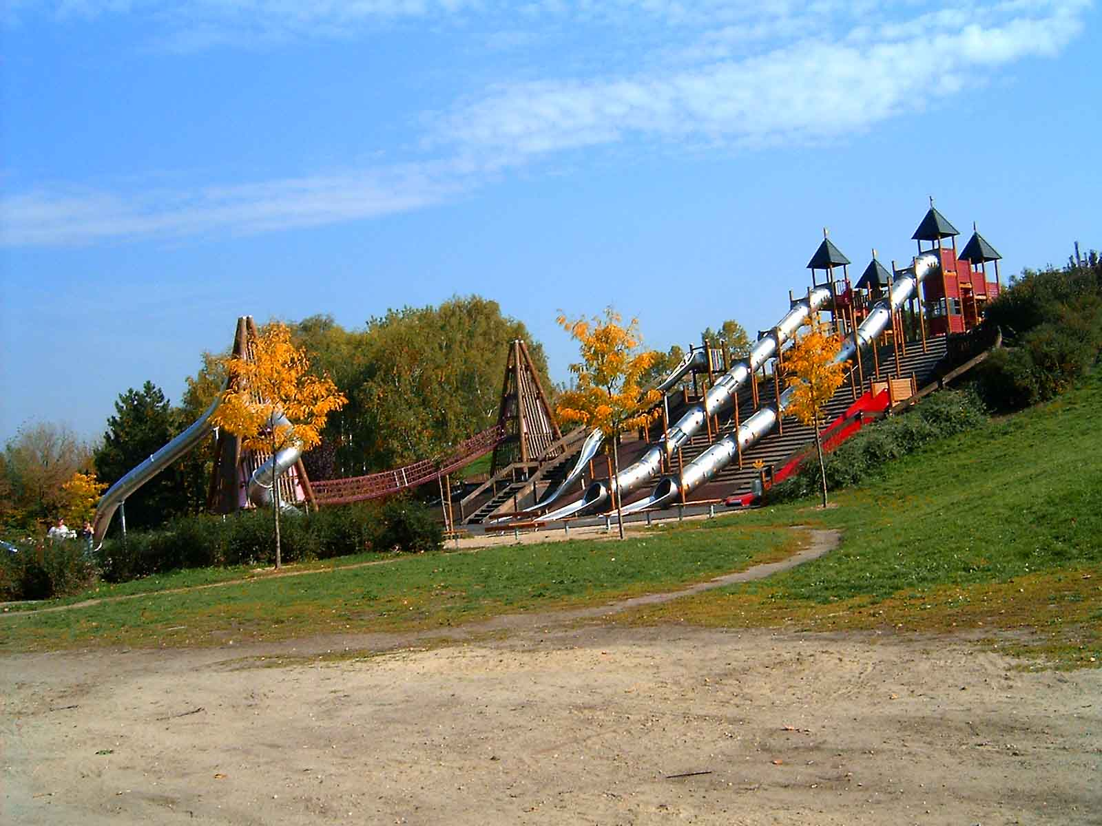 Játszótér az Óbudai-szigeten, más néven Hajógyári sziget (Budapest, III. kerület)